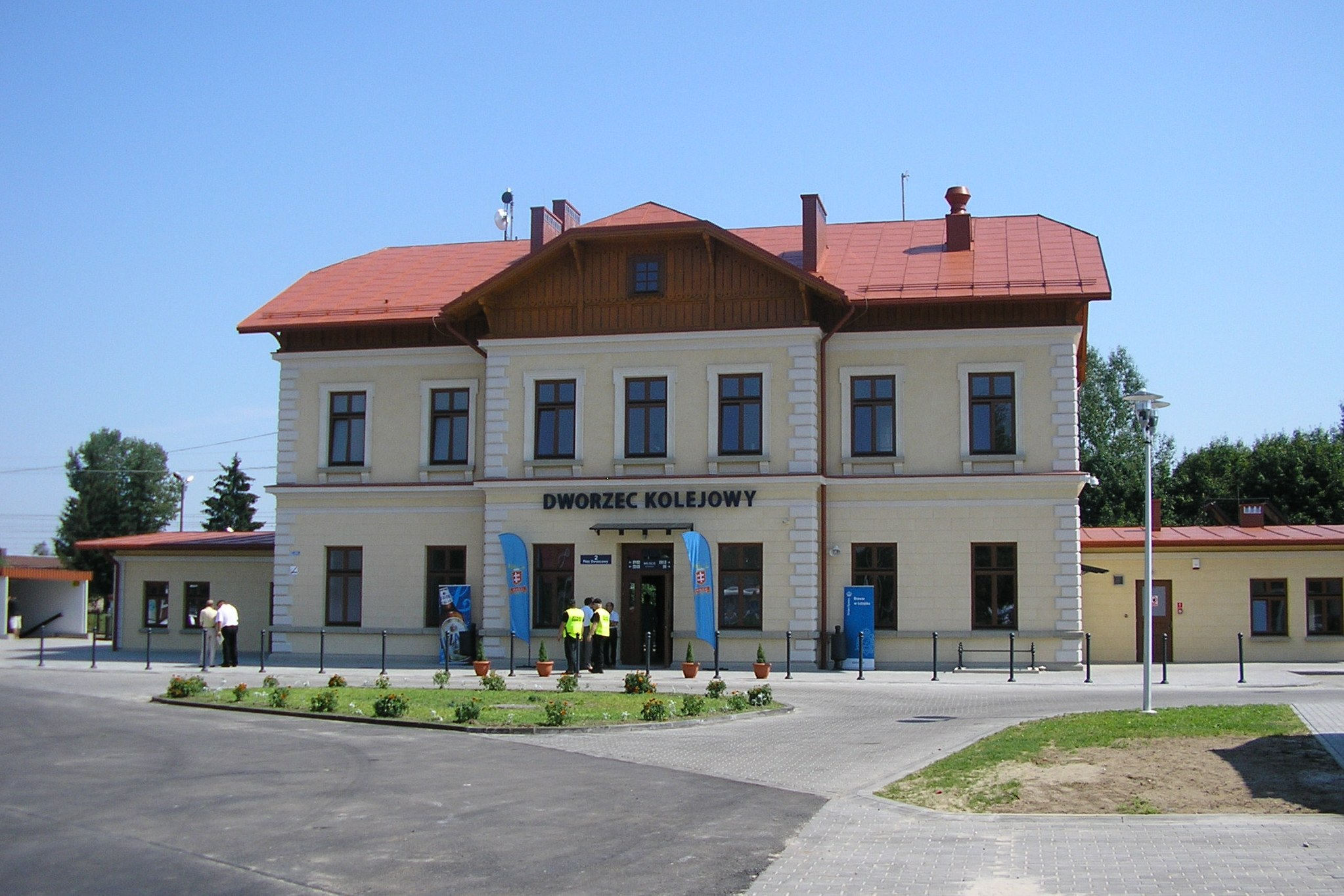 Leżajsk, dworzec kolejowy, 2012-08-03